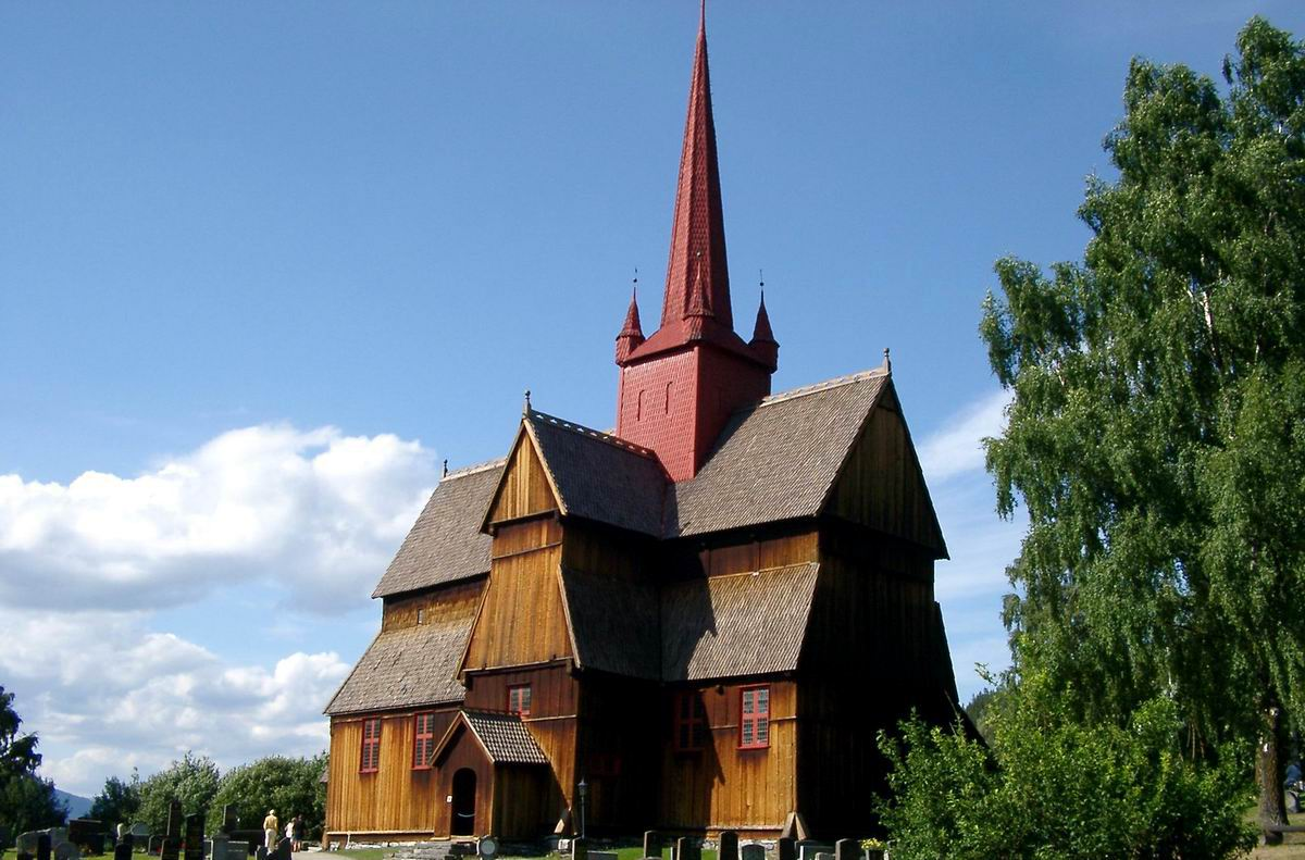 Stabkirche von Ringebu Norwegen